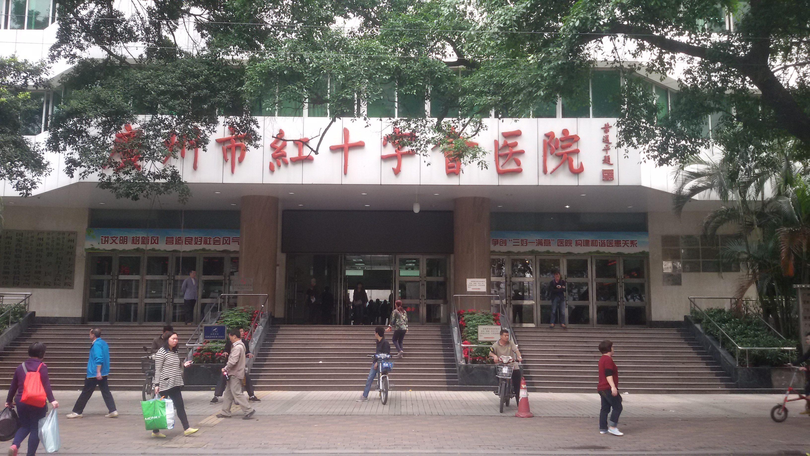 粵語: 廣州市紅十字會醫院嘅正門